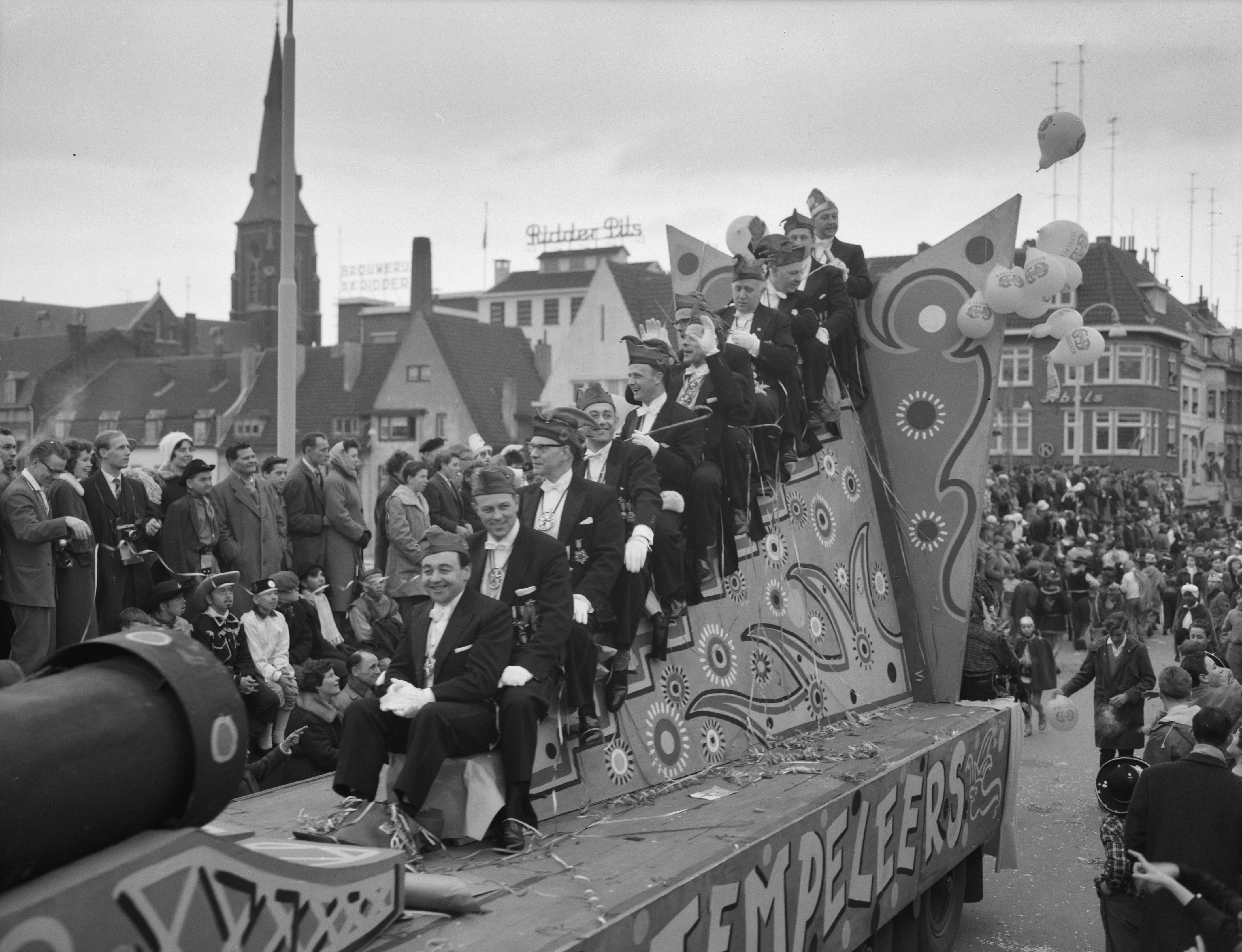 Collectie / Archief : Fotocollectie Anefo Reportage / Serie : [ onbekend ] Beschrijving : Carnavalsoptocht in Maastricht Datum : 12 februari 1961 Locatie : Maastricht Trefwoorden : optochten Fotograaf : Rossem, Wim van / Anefo Auteursrechthebbende : Nationaal Archief Materiaalsoort : Negatief (zwart/wit) Nummer archiefinventaris : bekijk toegang 2.24.01.04 Bestanddeelnummer : 912-0867